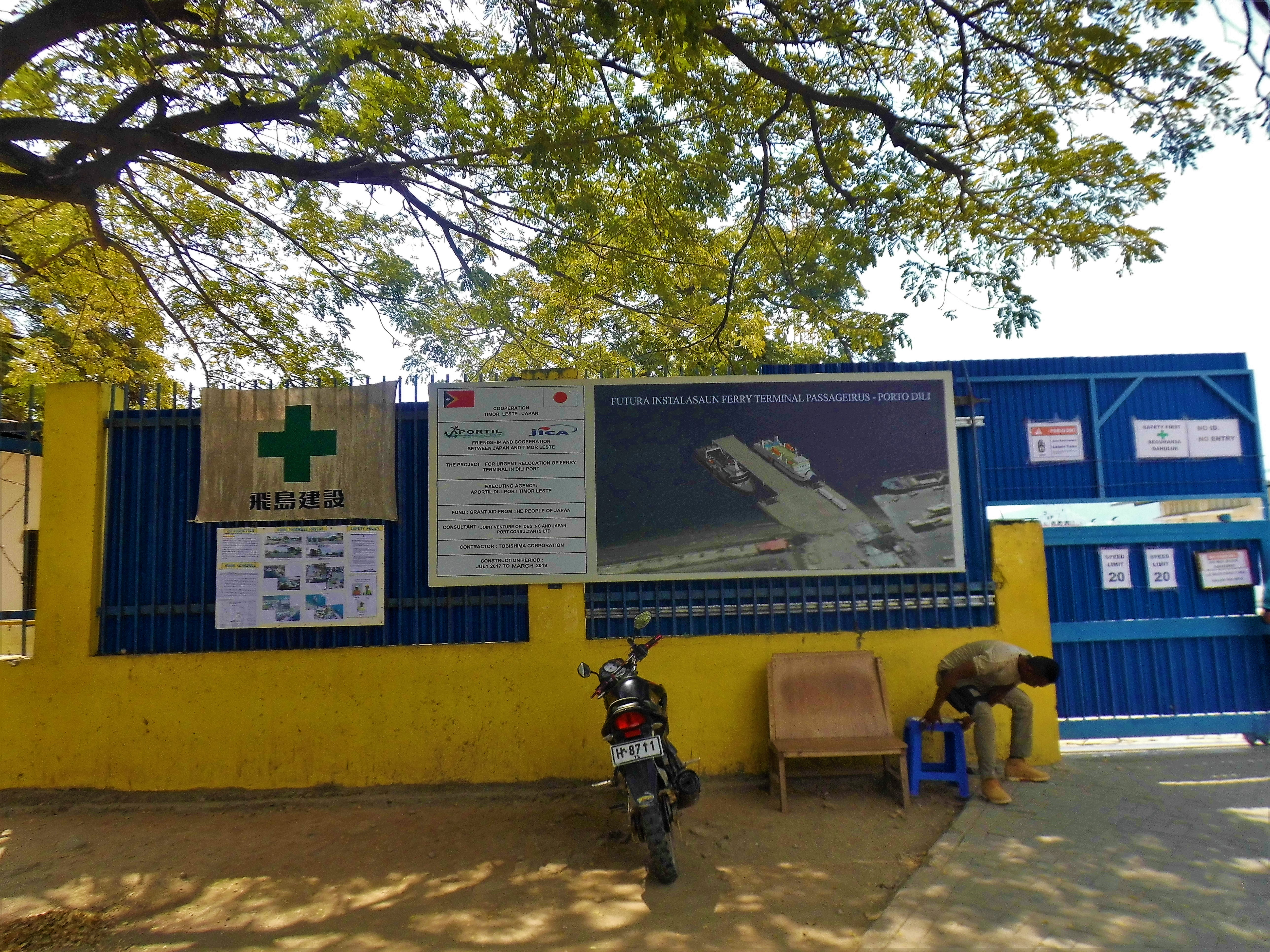 Direção Nacional dos Transportes Maritimos